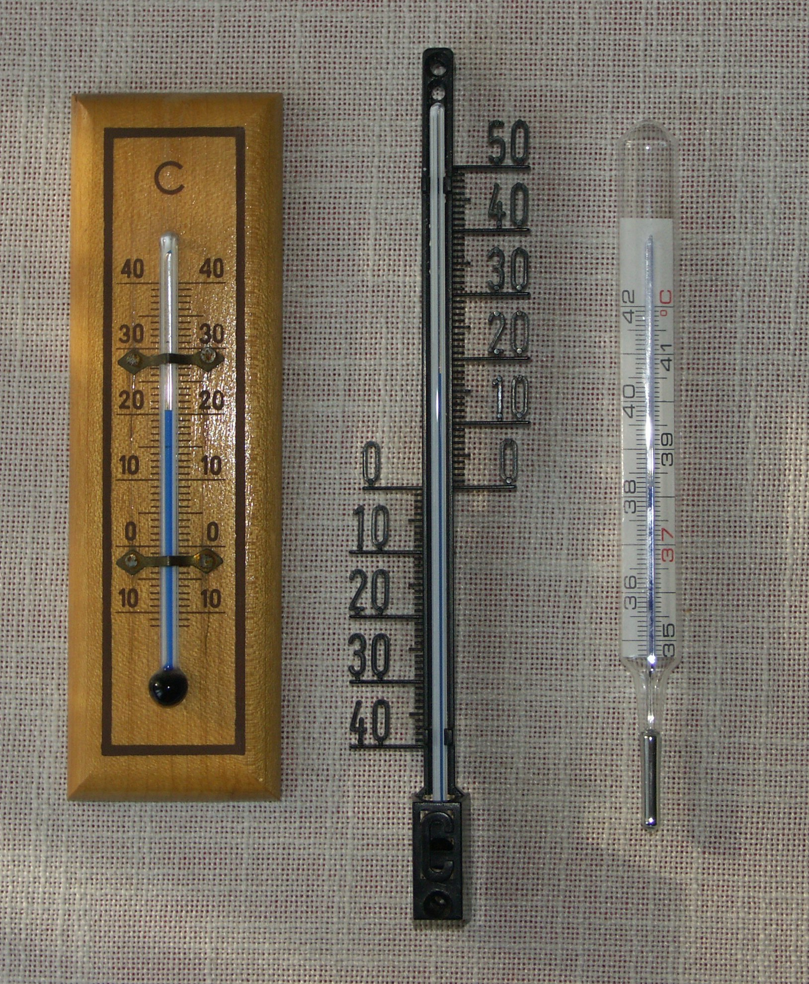 Drei (Fluessigkeits-)Ausdehnungsthermometer, links: Raumthermometer, mitte: Aussenthermometer, rechts: Fieberthermometer